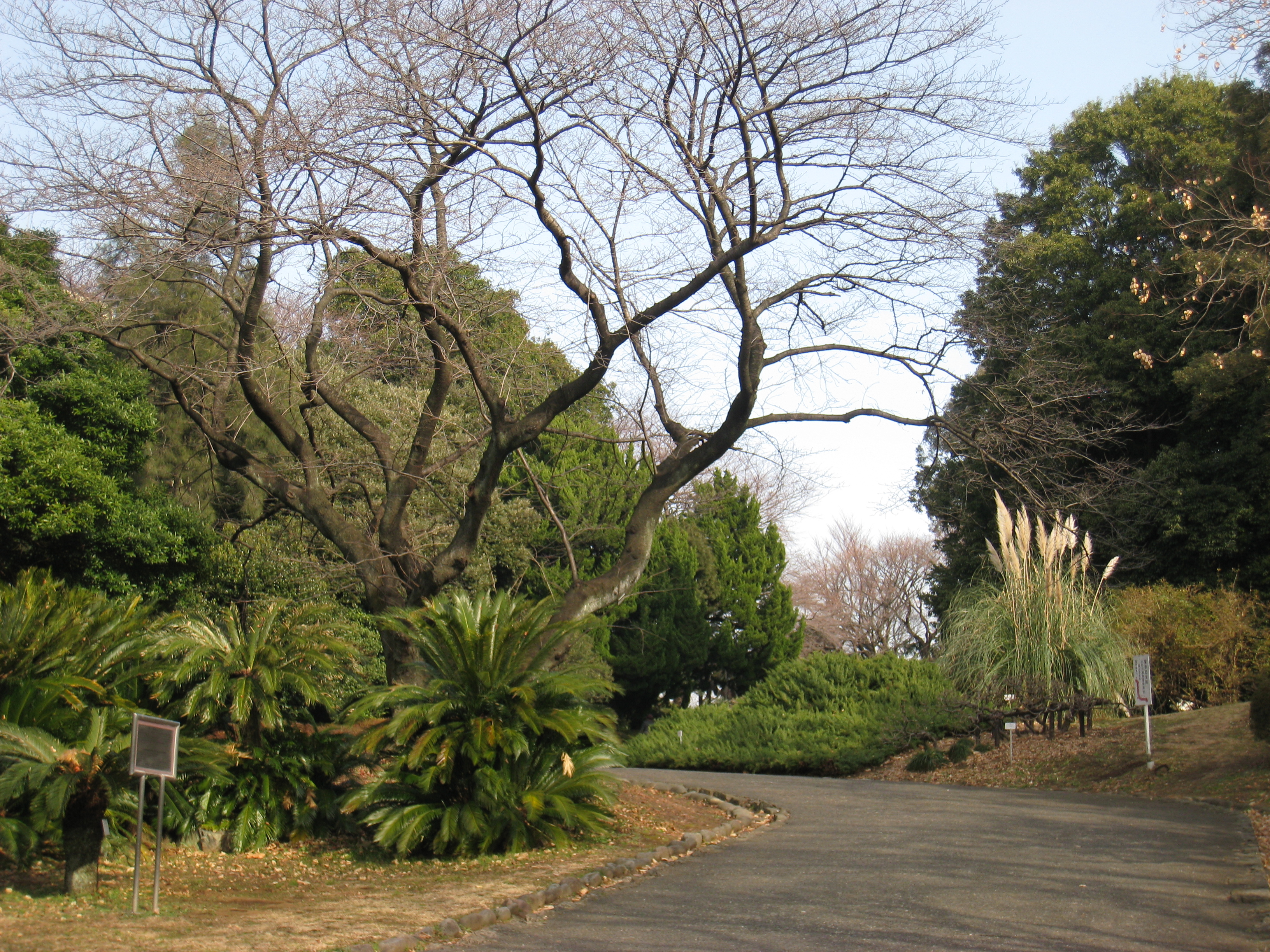 Koishikawa Botanical Gardens, Tokyo, Japan - entryway.